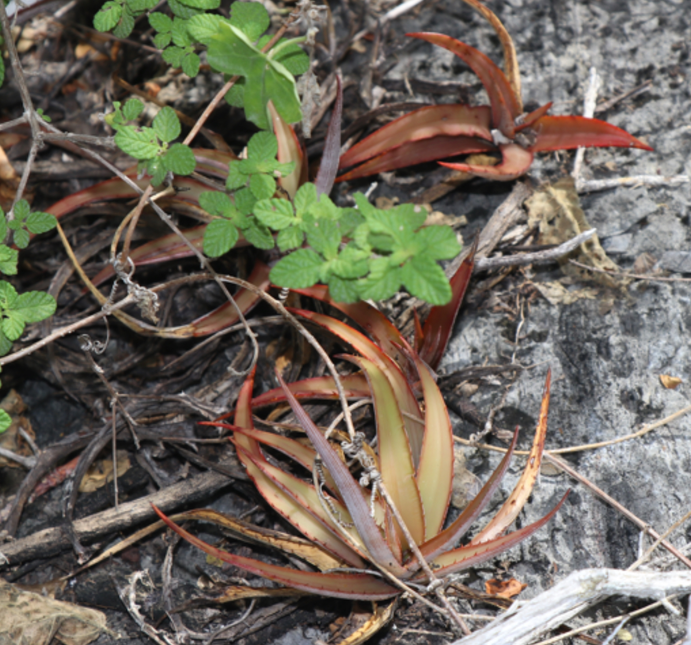 Cryptanthus heimenii am Typstandort, Sergipe, Brasilien